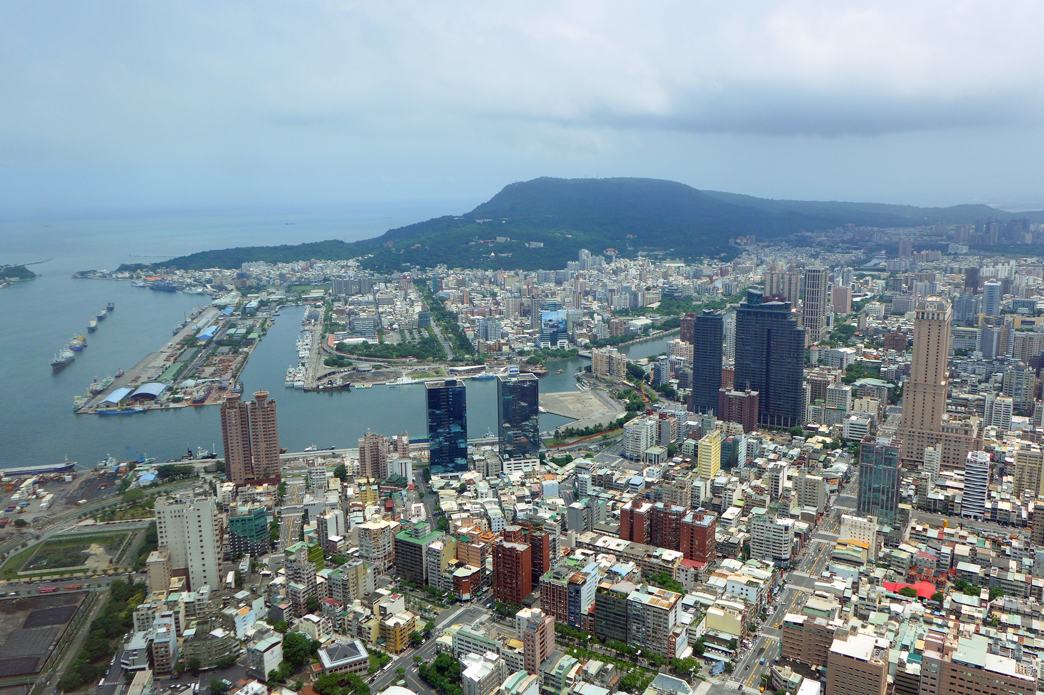 Love River, Kaohsiung